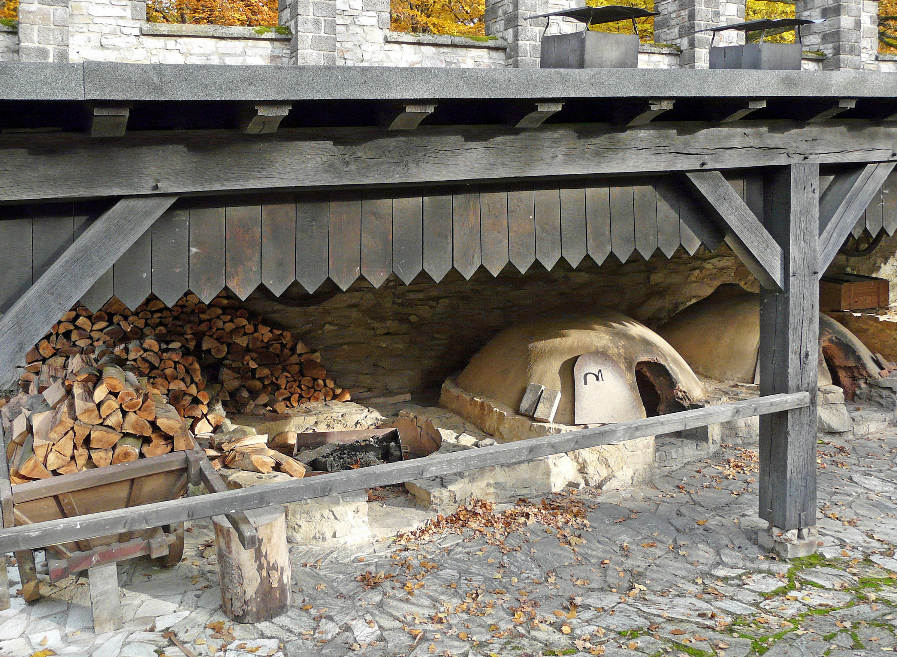 Backöfen im Kastell Saalburg